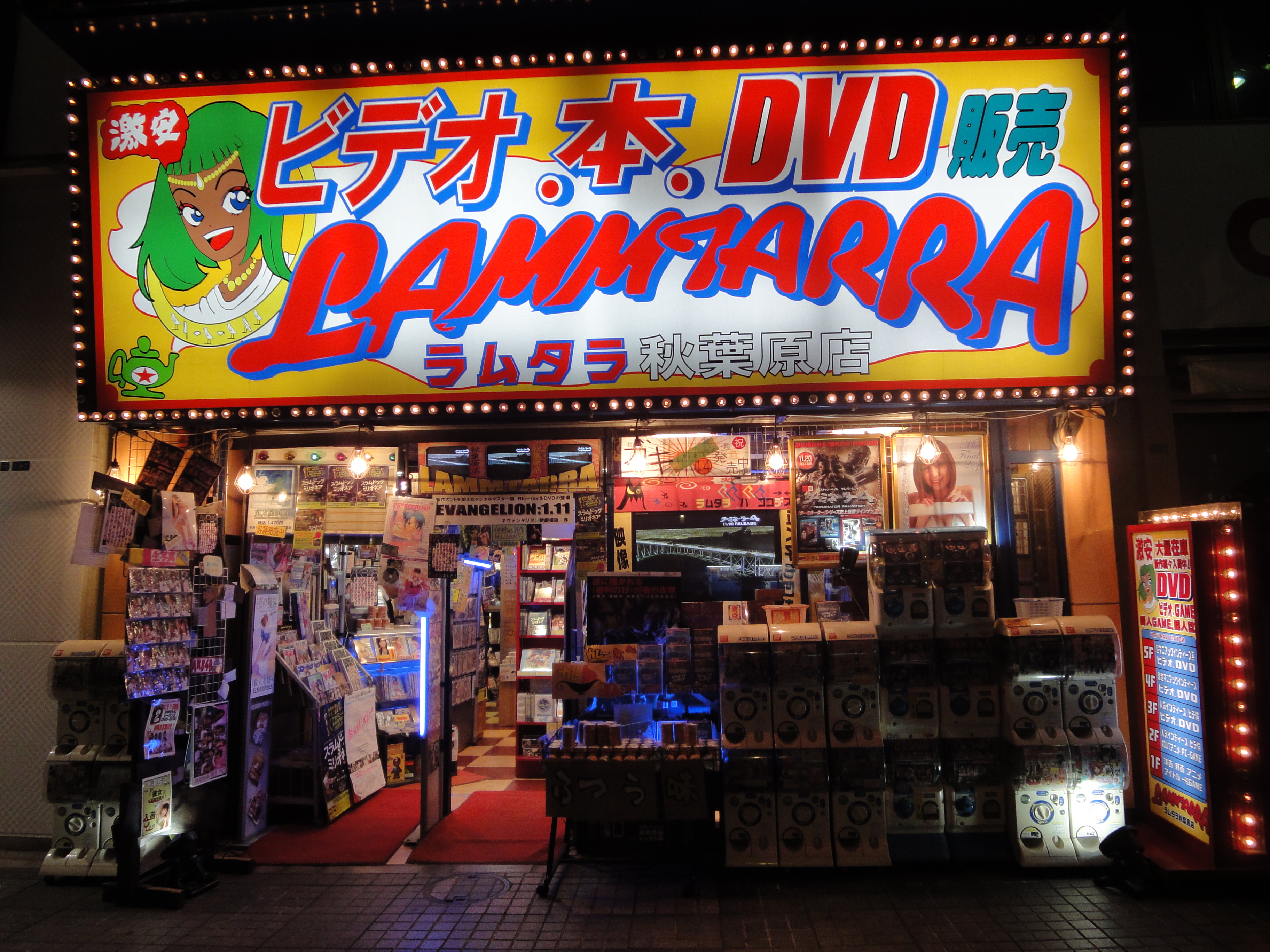 ラムタラ 秋葉原店 (東京都千代田区外神田1-13-1真神ビル)